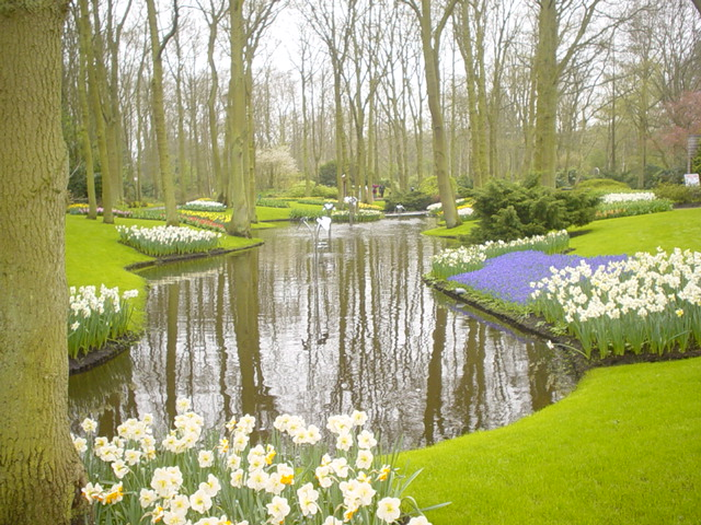 Keukenhof